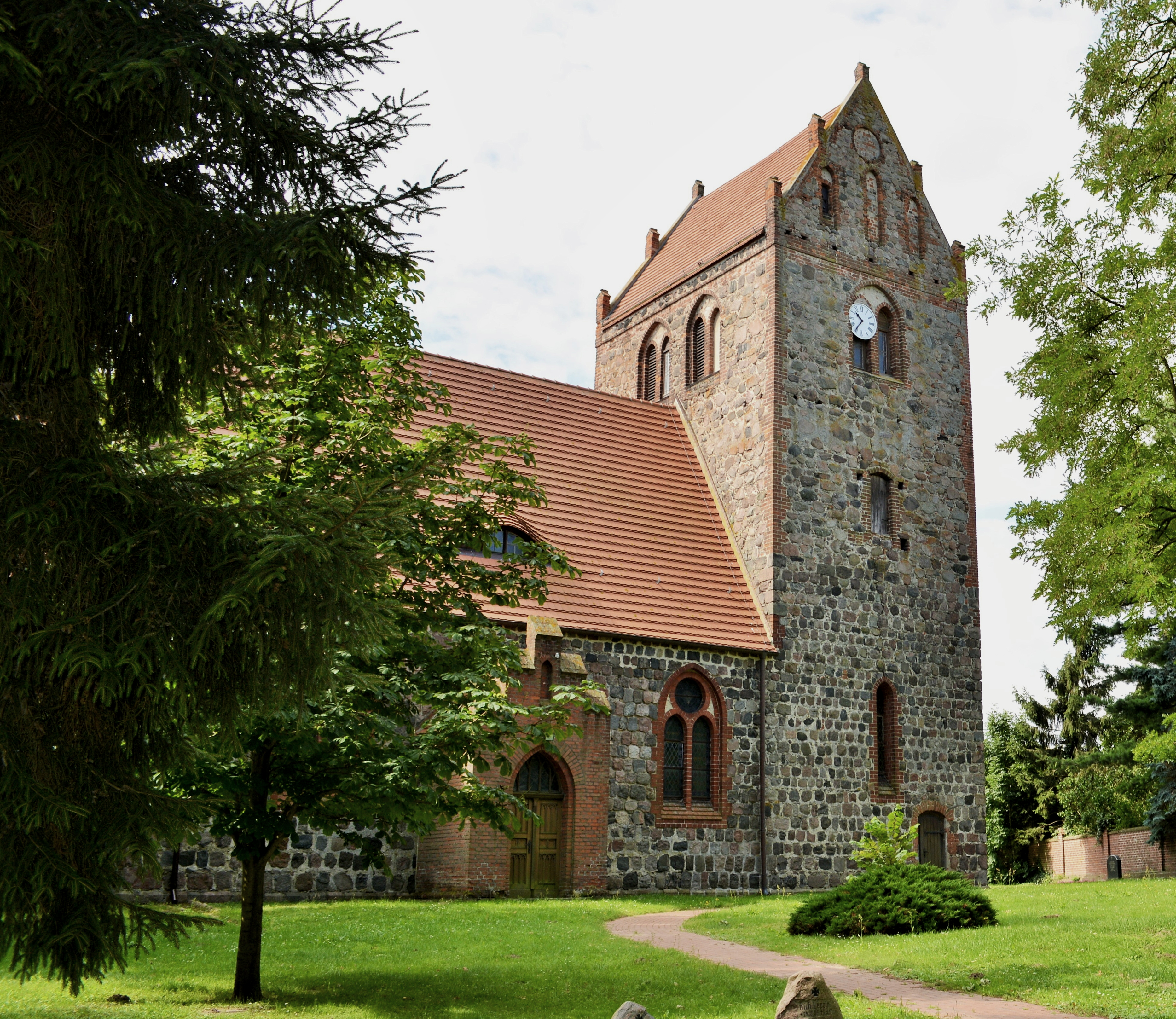 Denkmalgeschützte Dorfkirche in Gottberg, Ortsteil von Märkisch Linden, Landkreis Ostprignitz-Ruppin